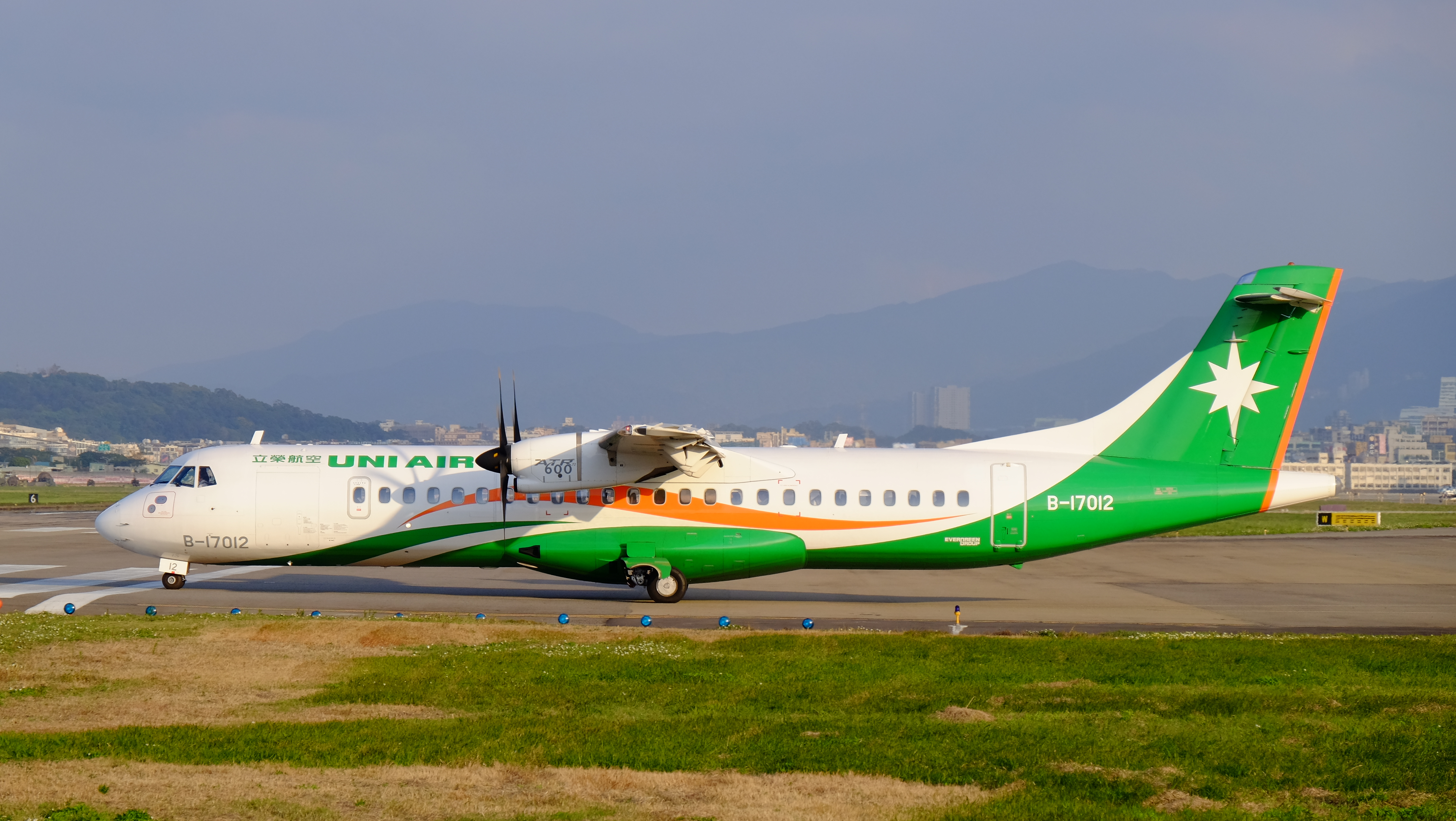 接近臺北松山機場跑道的立榮航空ATR 72-600 B-17012。